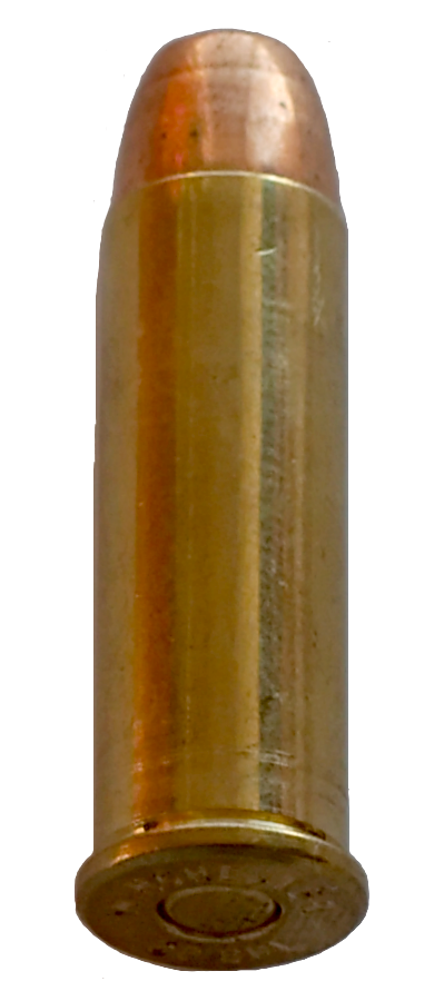 A .38 special cartridge